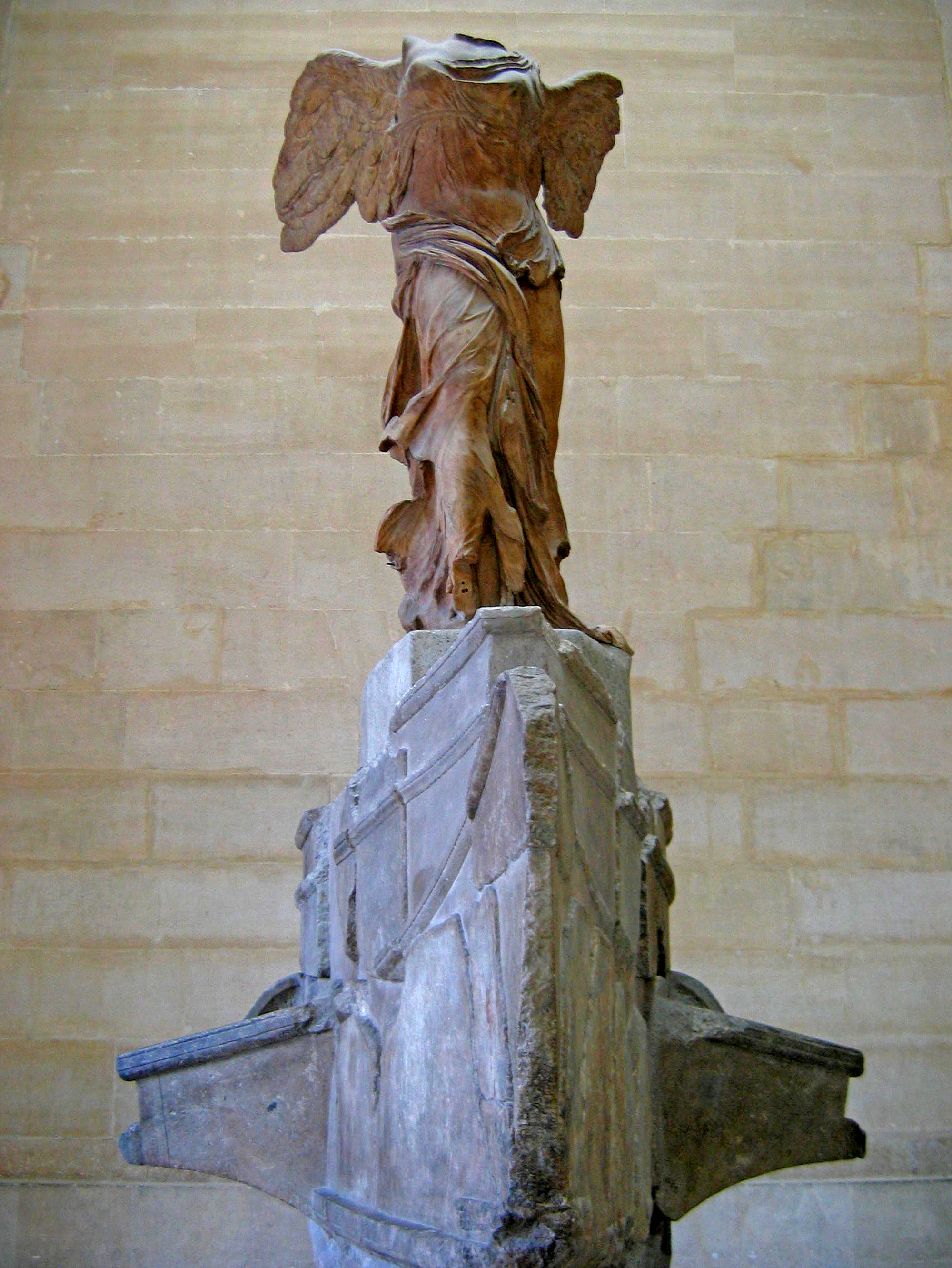 Victoria alada de Samotracia, también llamada niké de Samotracia y en griego Niki tis Samothrakis. Fotografía hecha en el Louvre. Y subida inicialmente a wikipedia con el nombre Victoria samotracia. Autor:Chosovi